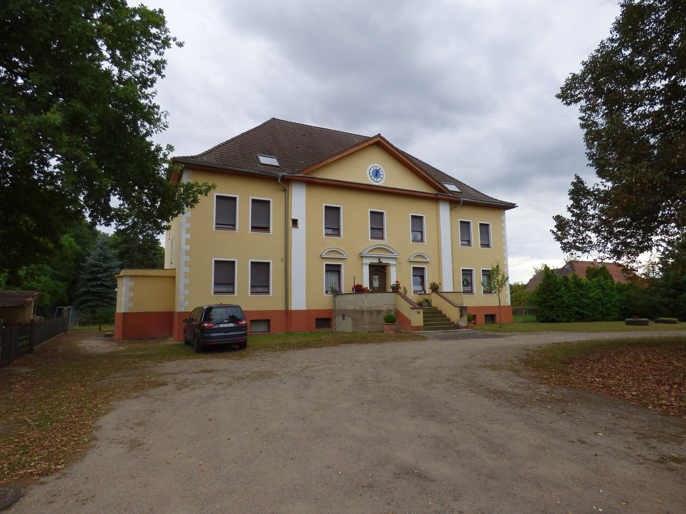 Gut Neu-Lönnewitz